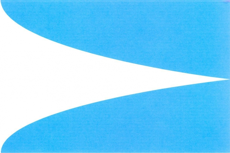 vlajka,Výrovice , okres Znojmo